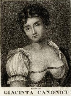 Giacinta Canonici, soprano